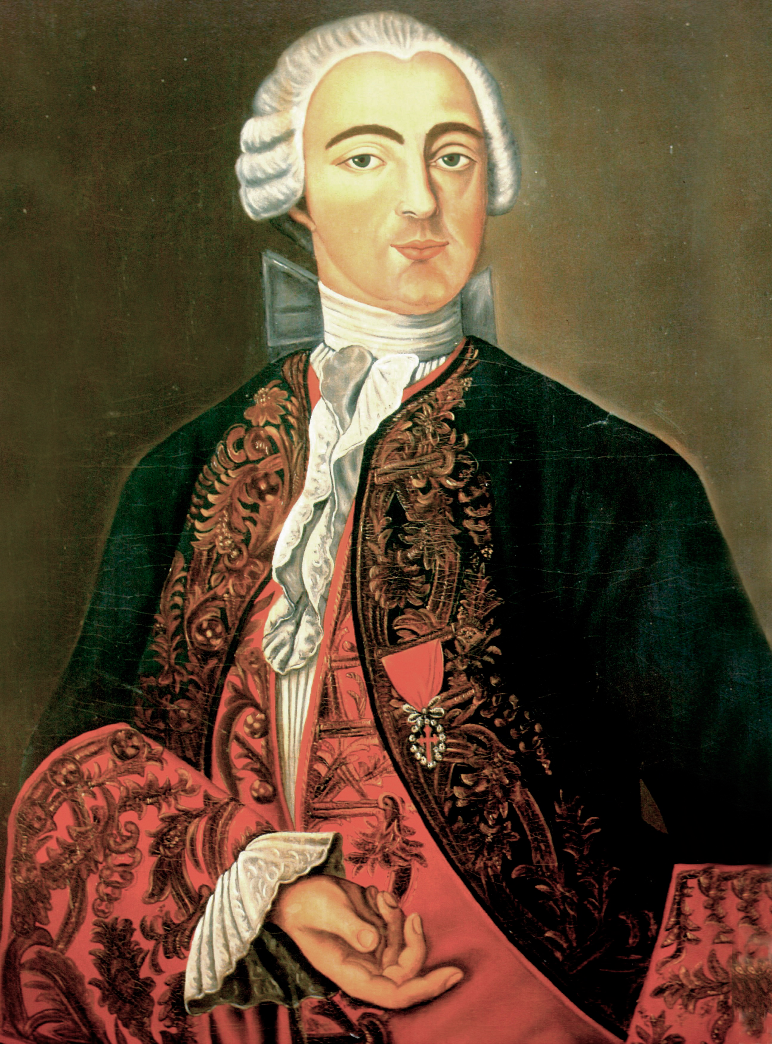 Pedro de Cevallos, retrato de autor anónimo conservado por sus descendientes, cortesía del Sr Vicente Sierra para la publicación del libro.